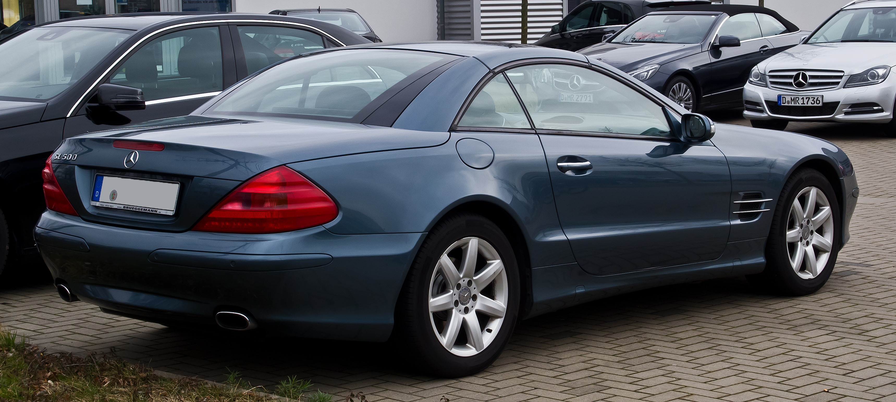 Mercedes-Benz SL 500 (R 230)